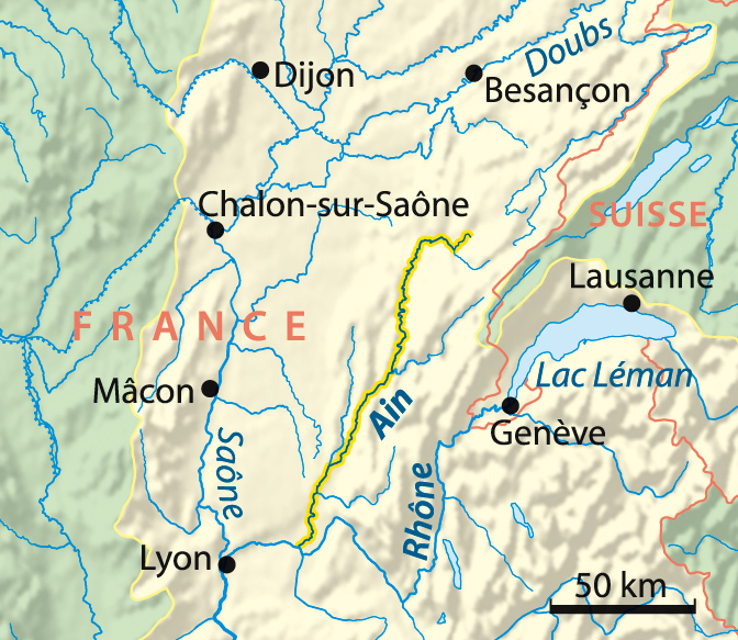 surlignage du tracé de la rivière Ain (affluent du Rhône) - France